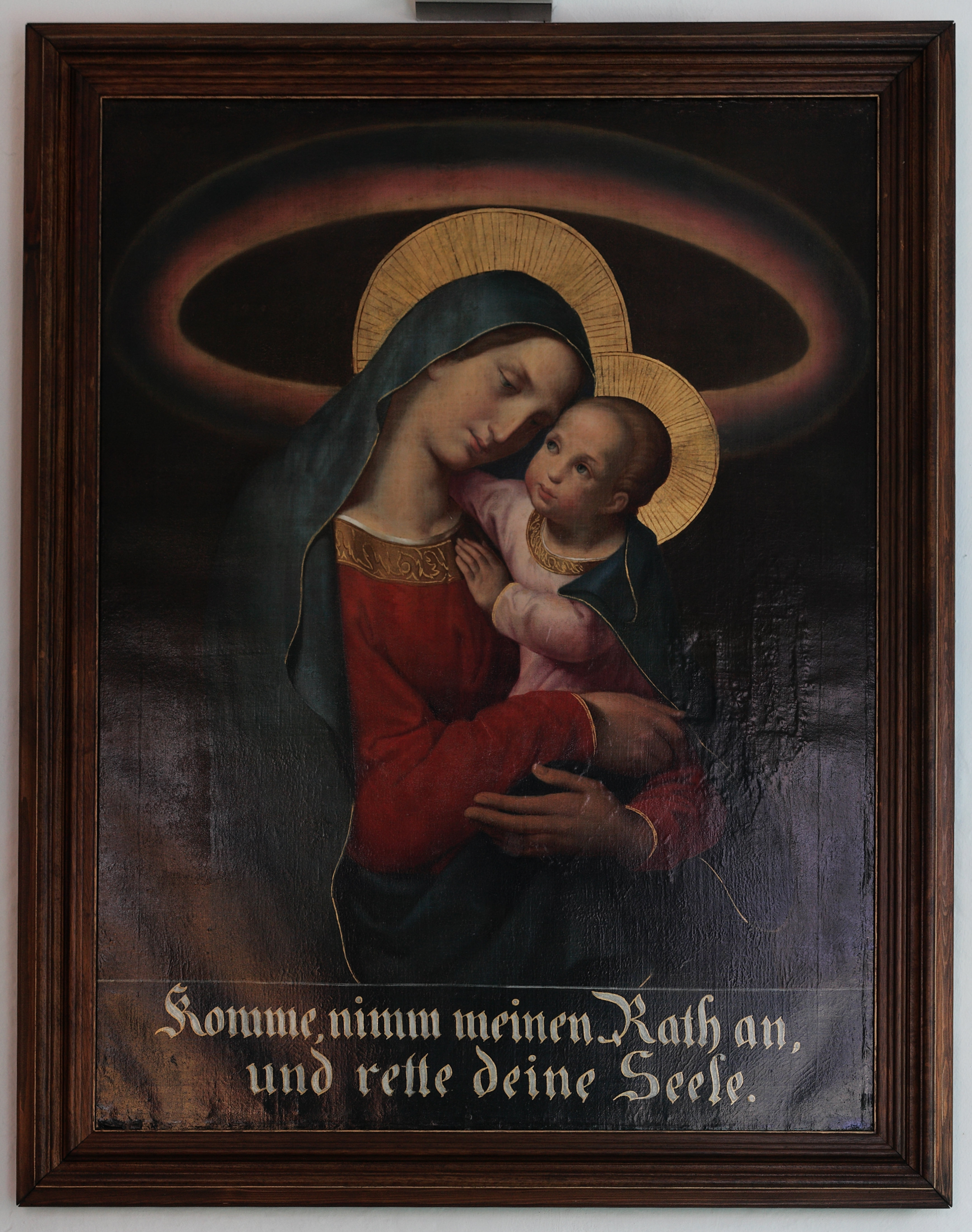 Dieses Marienbild in der Leonsteiner Pfarrkirche (Kapelle beim Haupteingang) ist eine Kopie des Gnadenbildes „Madonna del Buon Consiglio“ in Genazzano bei Rom. Als Künstler wird Leopold Kupelwieser angenommen. Die Inschrift lautet: Komme, nimm meinen Rath an, und rette deine Seele.